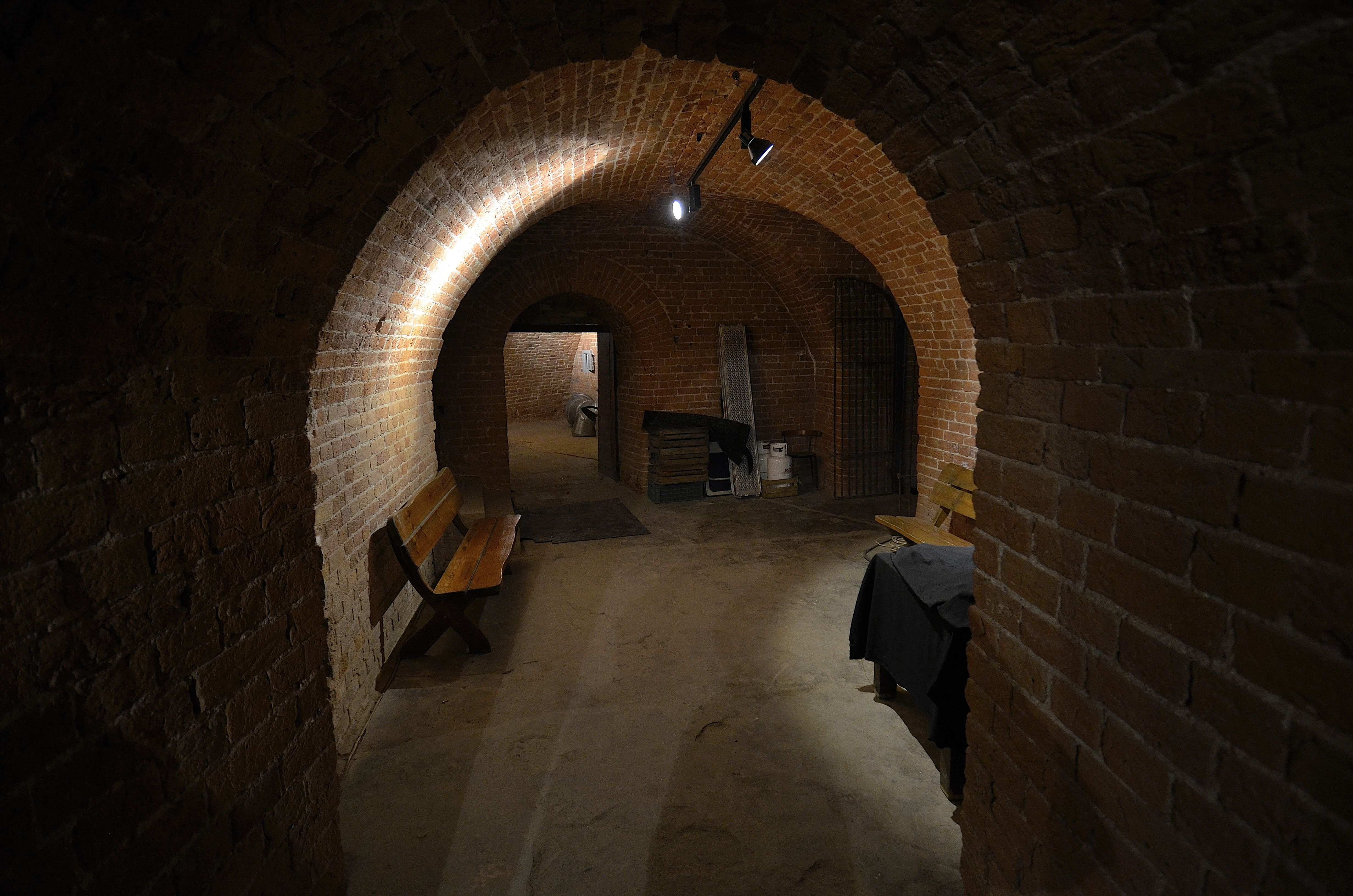 Podziemia Fortu Legionów (d. Władymira) Cytadeli Warszawskiej